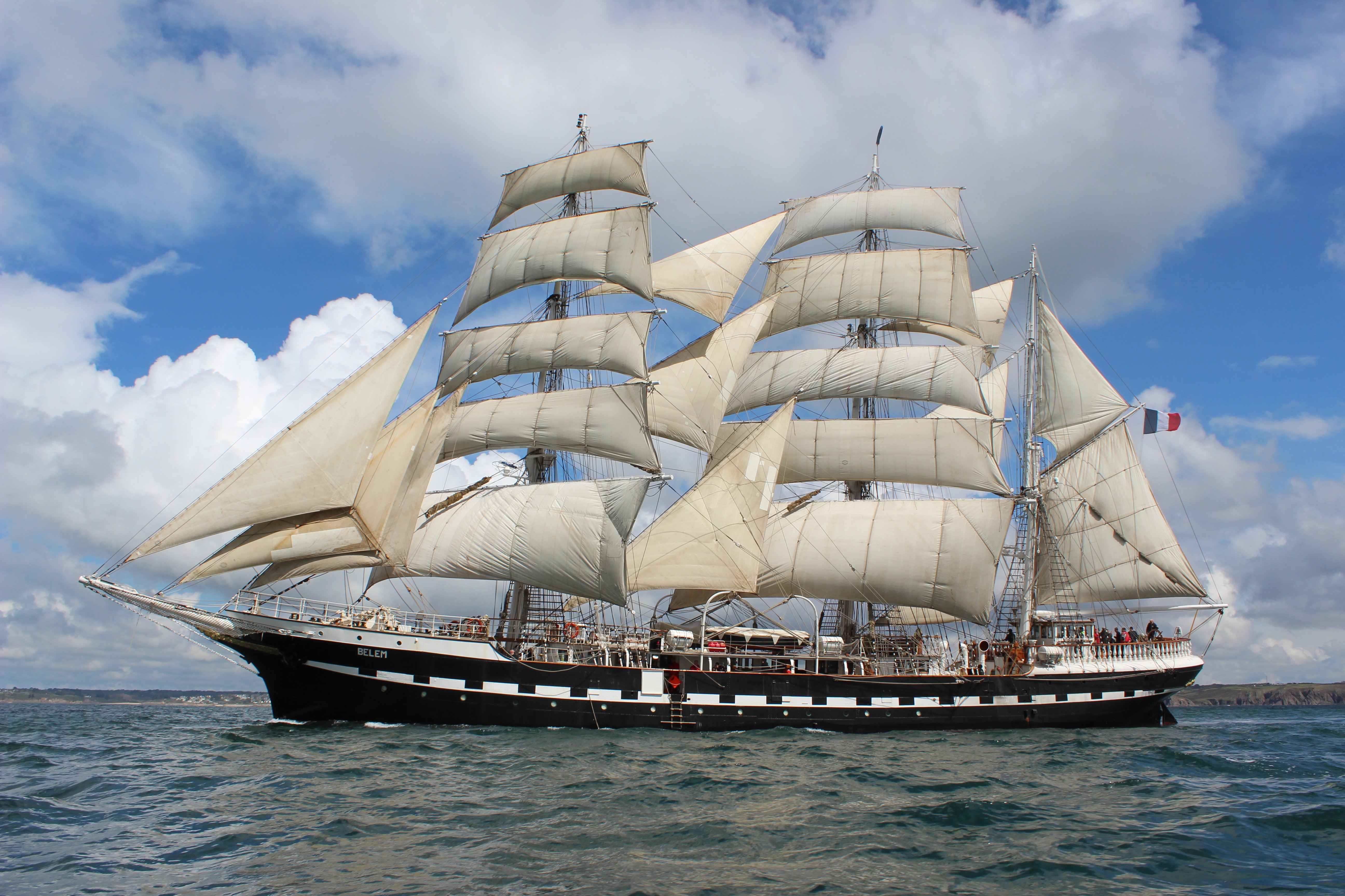 Belem au large de Brest le 28 avril 2012